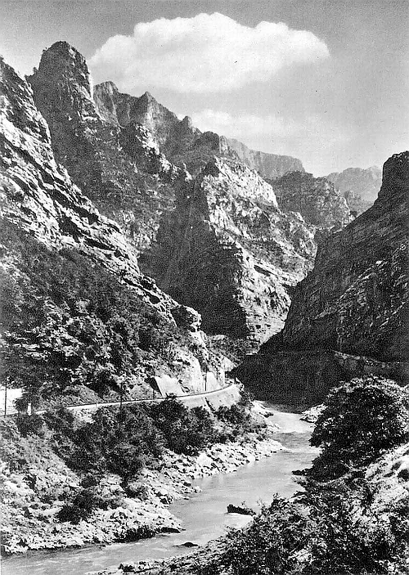 Narentaschlucht mit der Trasse der Narentabahn